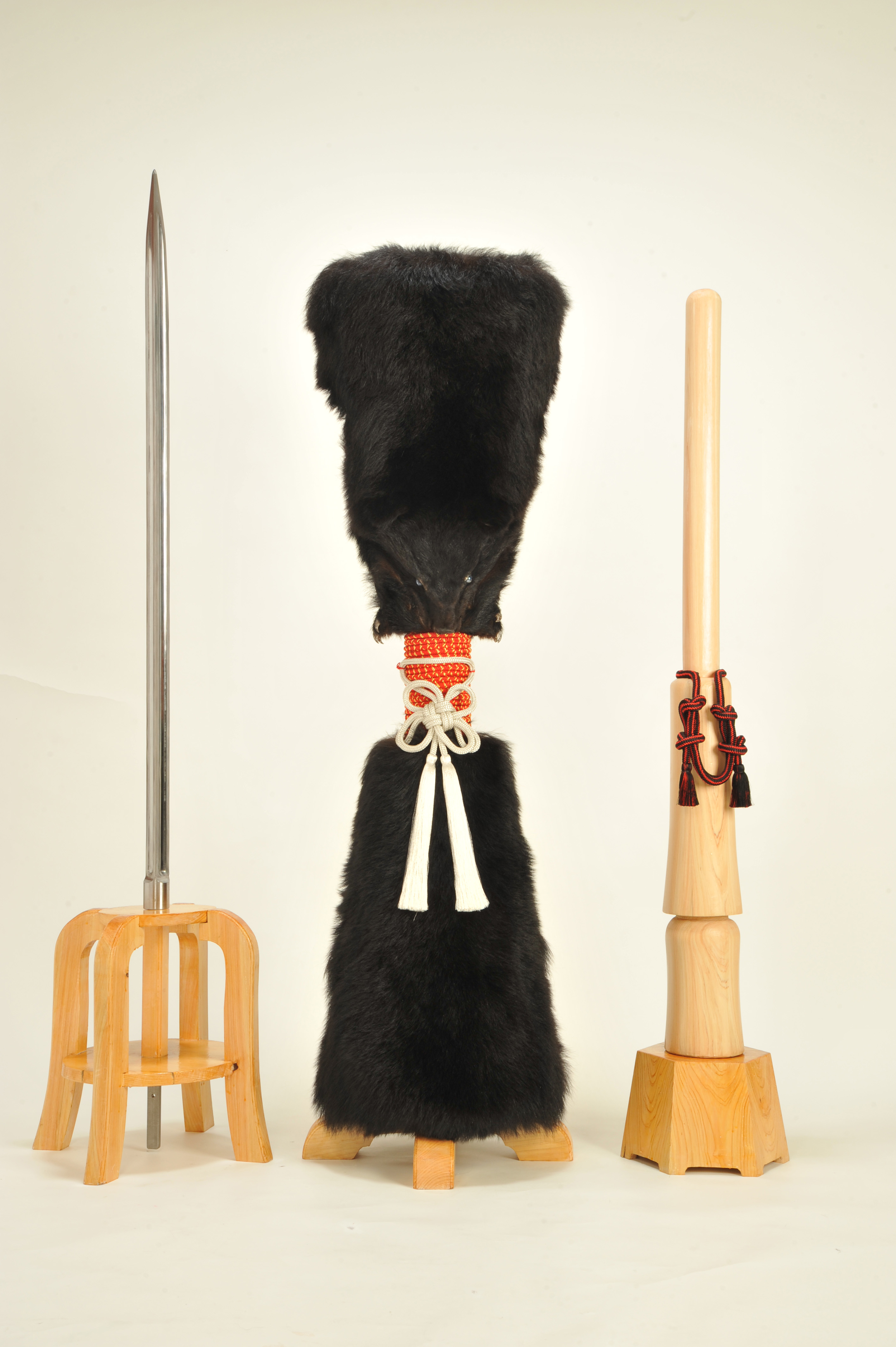 埼玉県東松山市で復元された御手杵の槍と熊鞘、白鞘